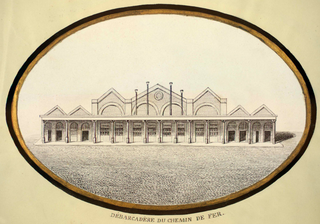 Le premier débarcadère intra muros réalisé par Alfred Armand. Vvue d'artiste par Baron en 1860.